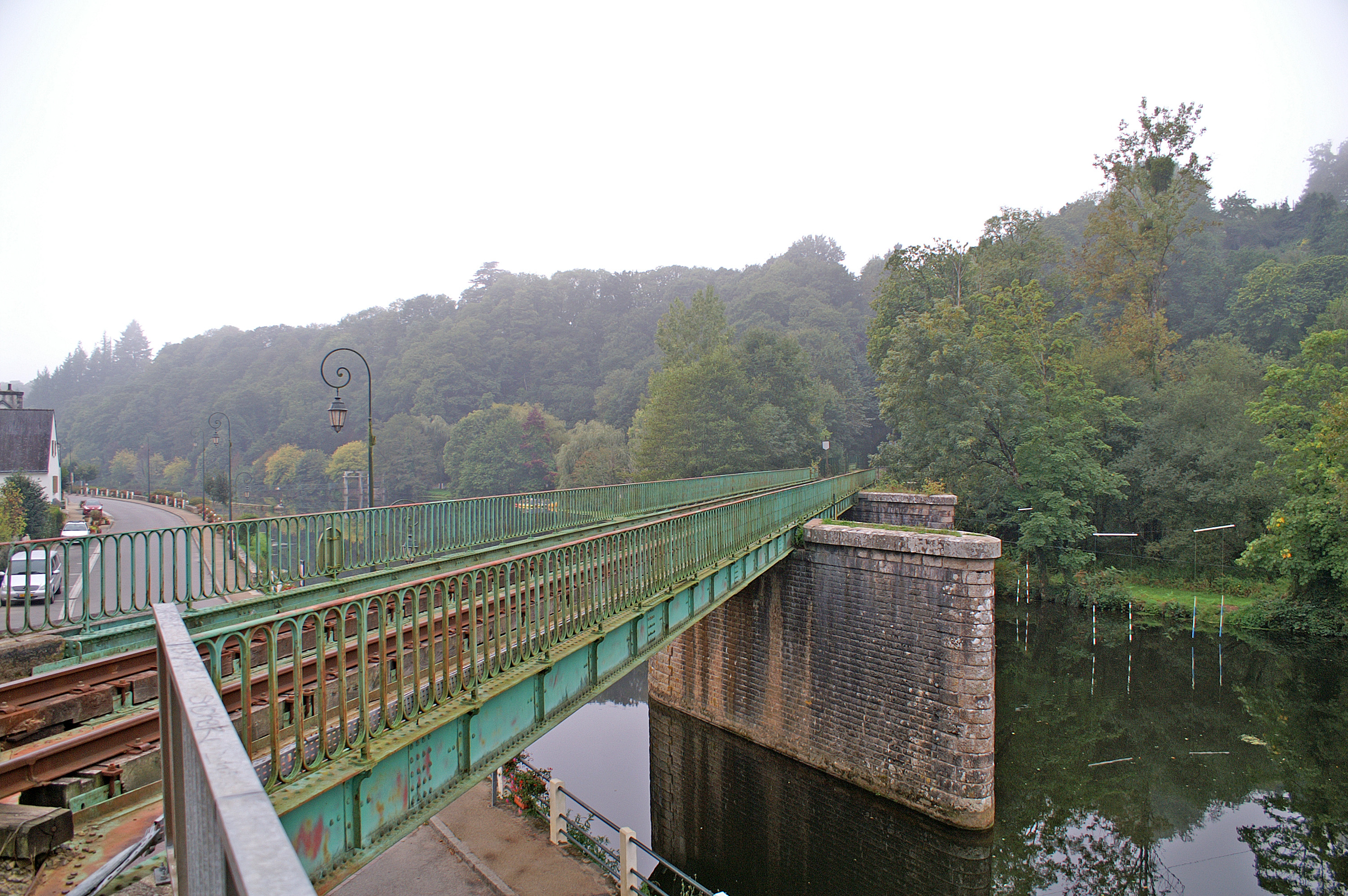 Le pont Saint-Nicolas sur la ligne d'Auray à Pontivy.